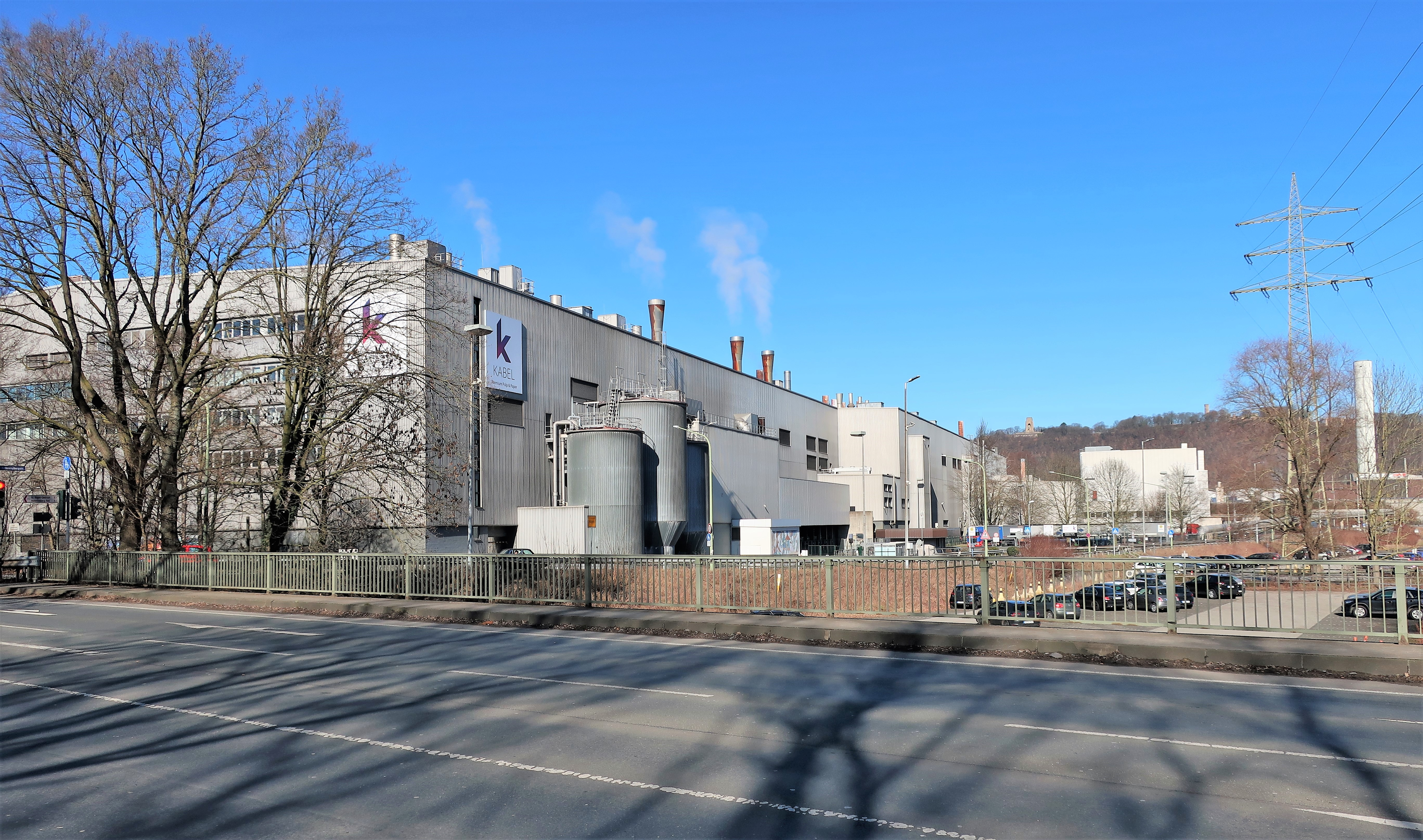 Kabel Premium Pulp & Paper in Hagen-Kabel, Schwerter Straße 263. Die Papierfabrik Kabel wurde 1896 gegründet, ab 1959 Feldmühle-Konzern, 1990 Stora-Konzern, 1998 StoraEnso und 2016 Kabel Premium Pulp & Paper.